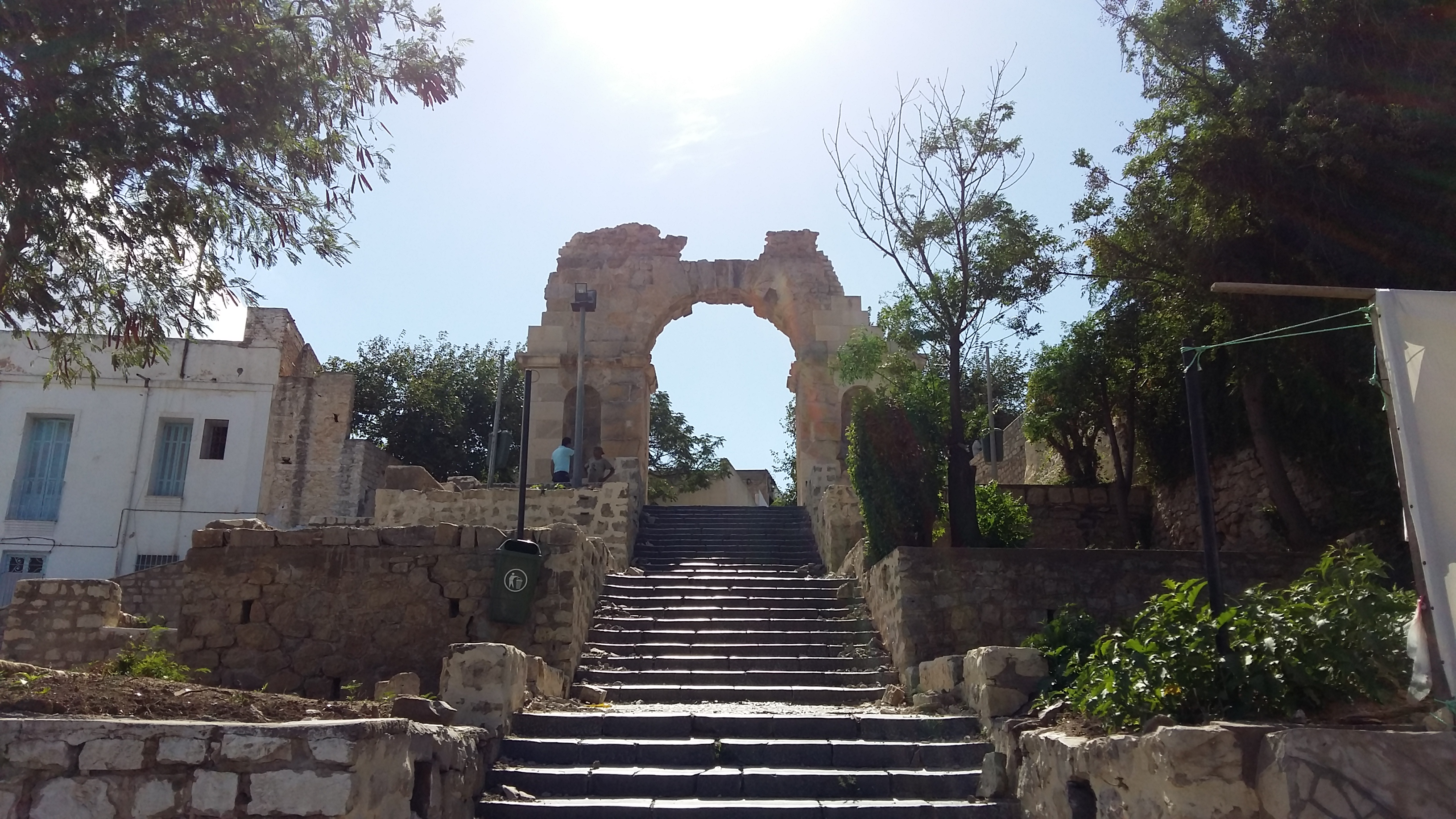 Porte romaine